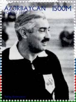 Azeri postage stamp